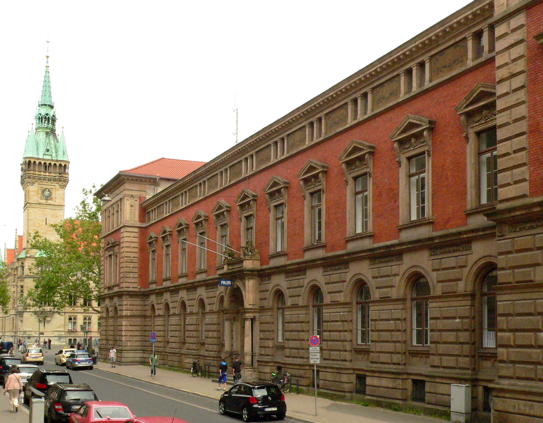 Polizeidirektion Braunschweig, Dienstgebäude Münzstrasse